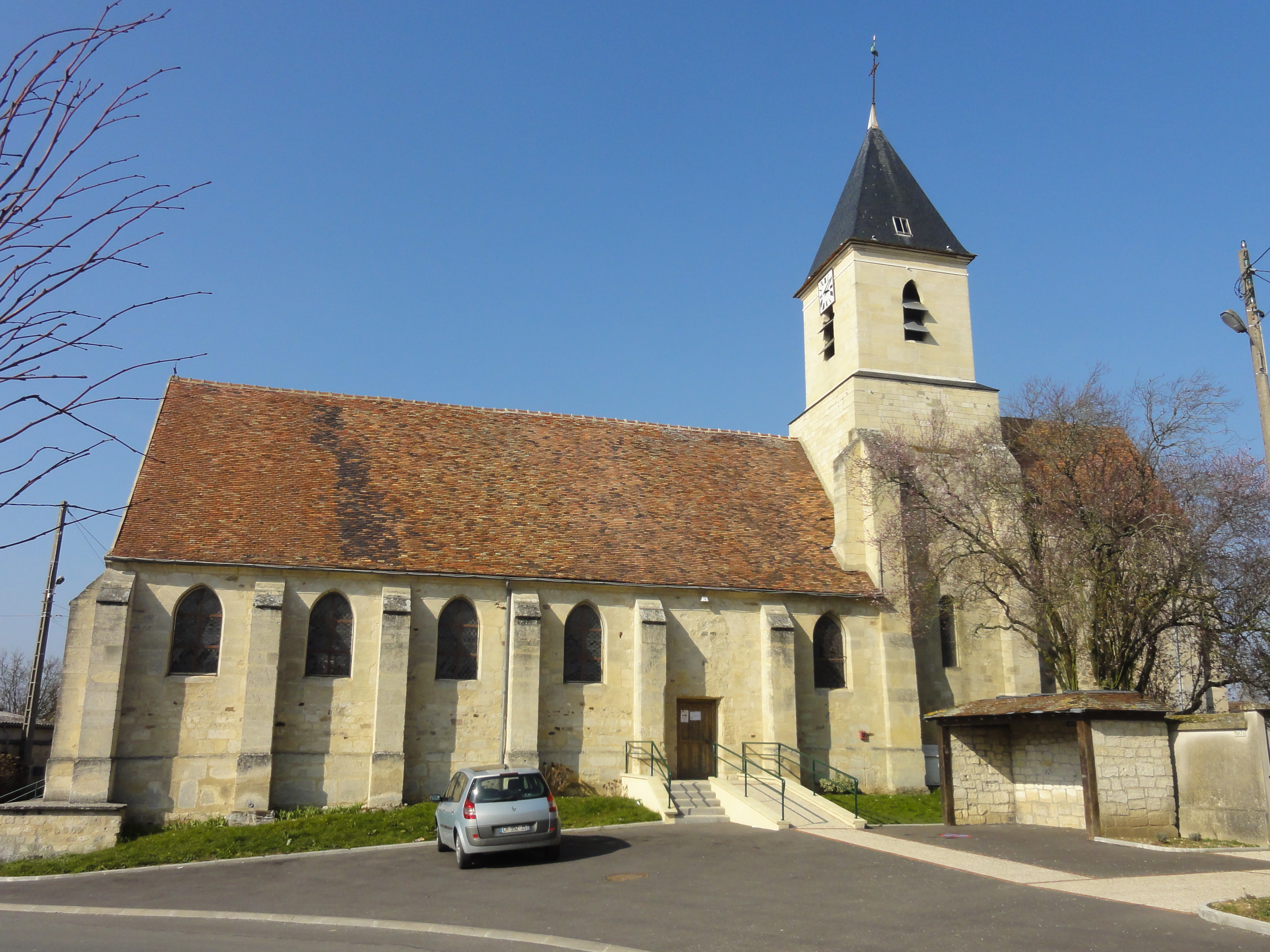 Église Saint-Nicolas de Fresnoy-en-Thelle - voir titre.